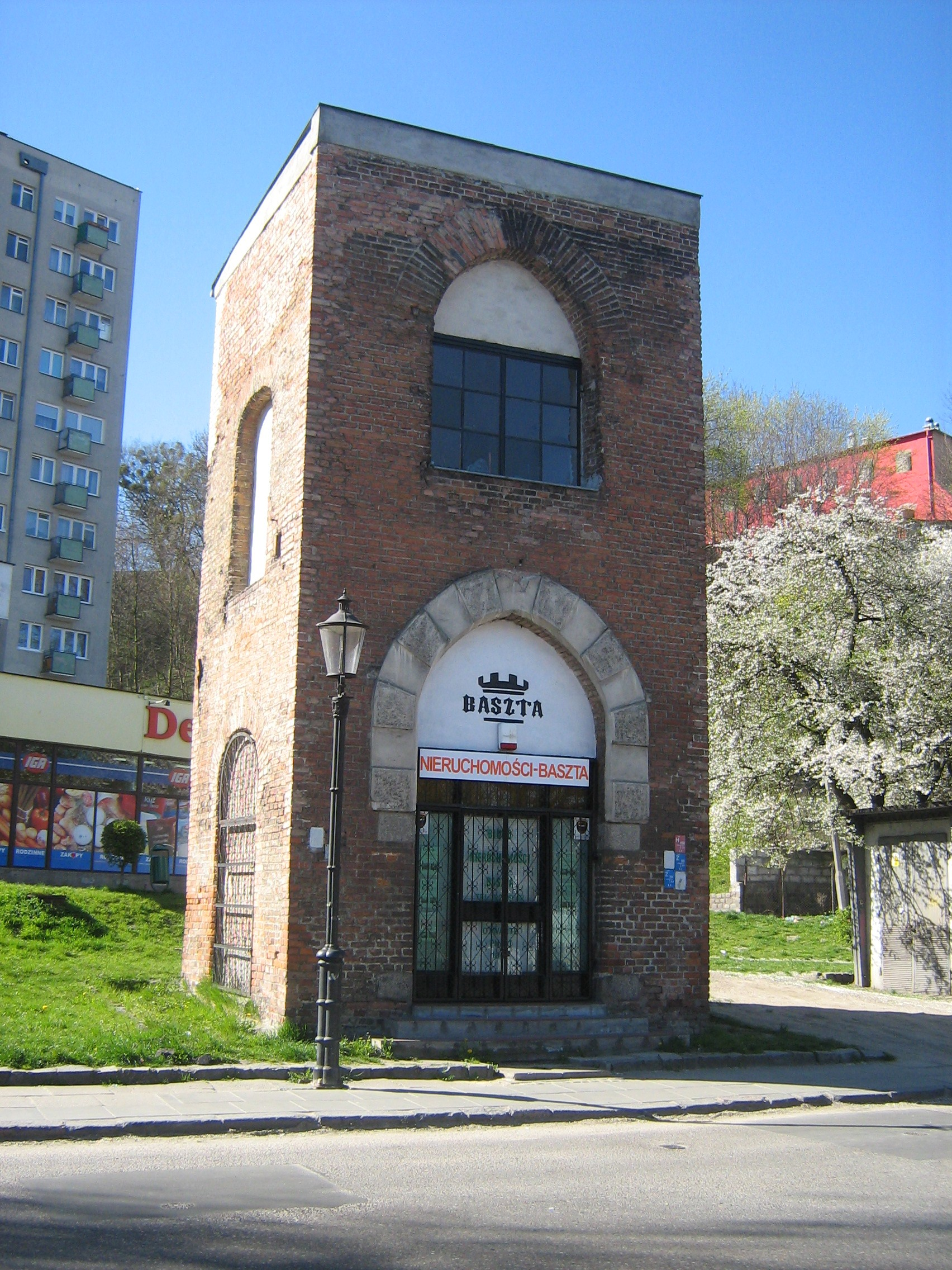 Wieża Kościoła Zbawiciela na Zaroślaku w Gdańsku (zabytek nr rejestr. A-558 z 30.10.1971